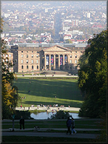 Beschreibung: Schloss Wilhelmshöhe im Bergpark Wilhelmshöhe (Kassel, Germany) mit Schlossteich (im Hintergrund die Stadtteile Wilhelmshöhe und Wahlershausen) Fotograf: Christoph Jüngling Bildquelle: selbst fotografiert Aufnahme: 18.10.2003 16:04:50 Lizenzstatus: GNU FDL 18:36, 22. Feb 2004 Juengling 450 x 600 (99744 Byte) (Kassel, Schloss Wilhelmshöhe mit Schlossteich (im Hintergrund der Stadtteil Wilhelmshöhe))